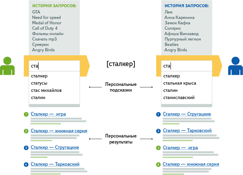 Пузырь фильтров — Различие при поиске